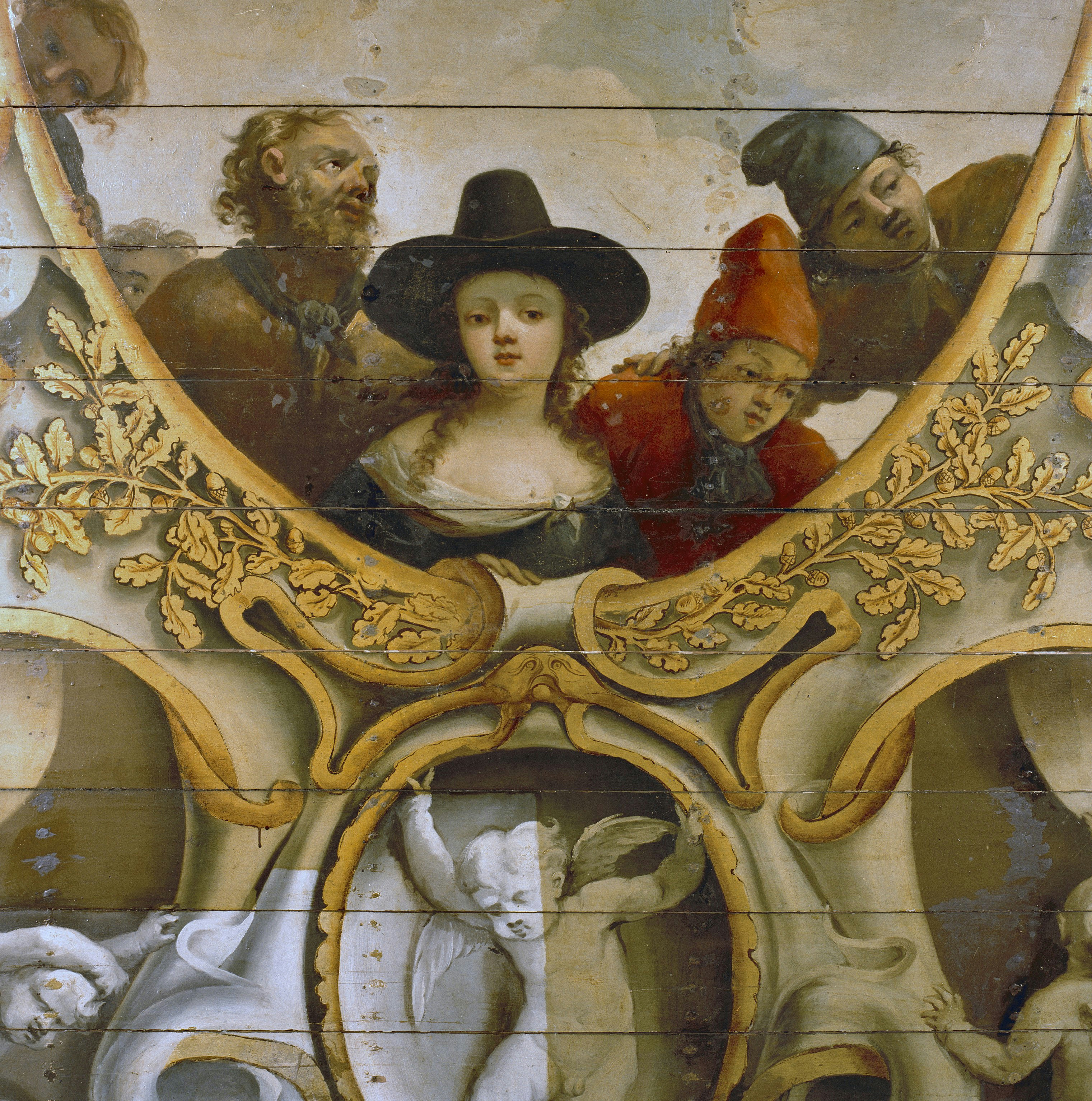 BINNENHOFCOMPLEX: INT. EERSTE KAMER, ZAAL, PLAFONDSCHILDERINGEN (TIJDENS RESTAURATIE)